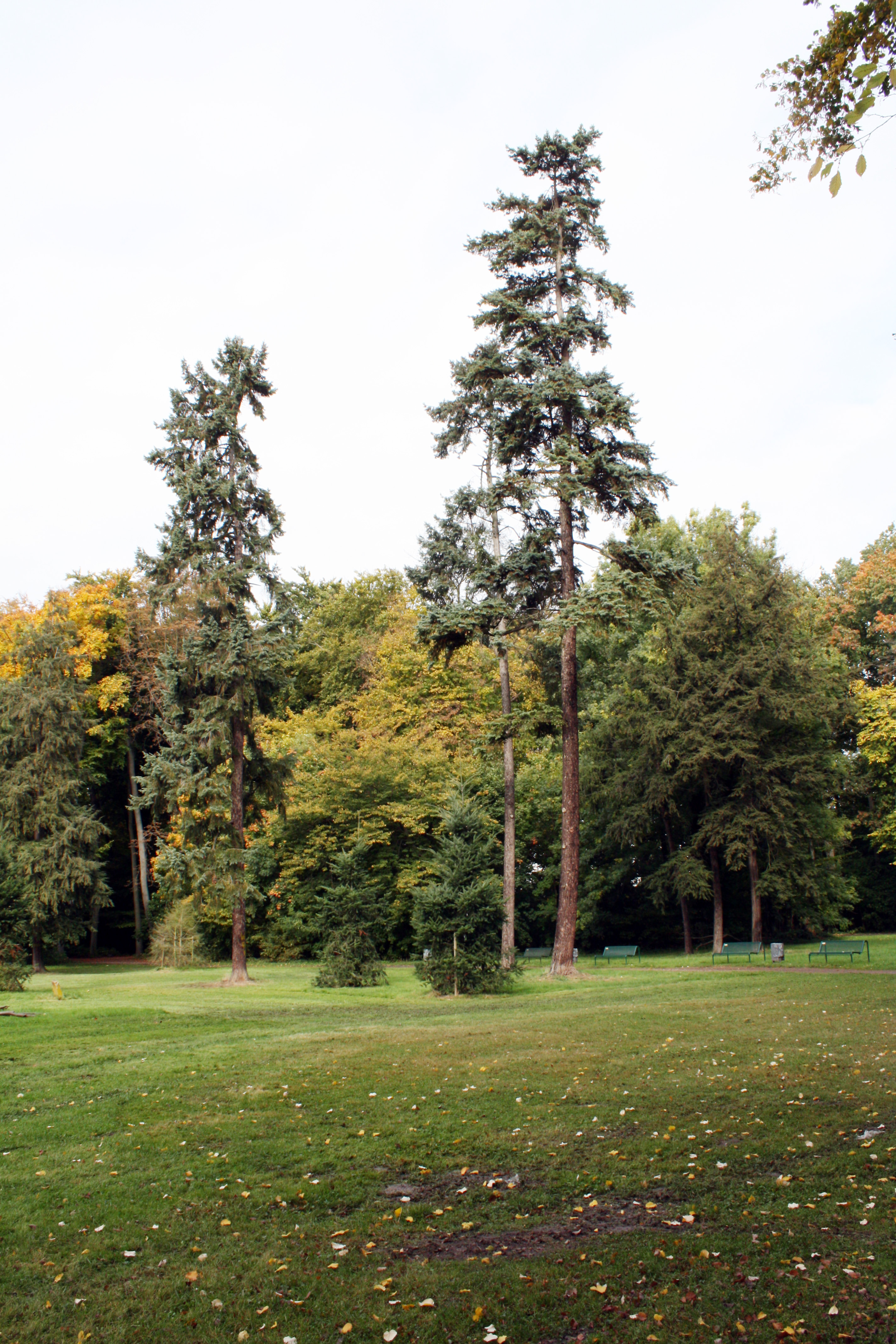 Köln-Lindenthal, der Stadtwald im nordwestlichen Bereich